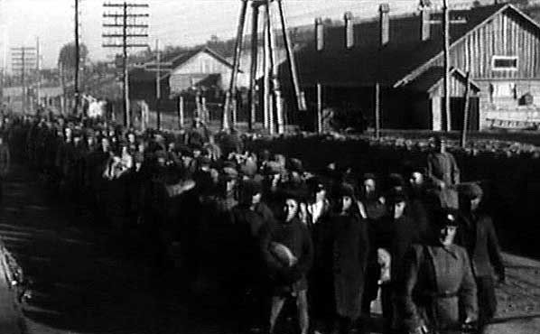 Заключенные на строительстве канала Москва-Река-Волга Prisoners on building of Moscow-Volga canal